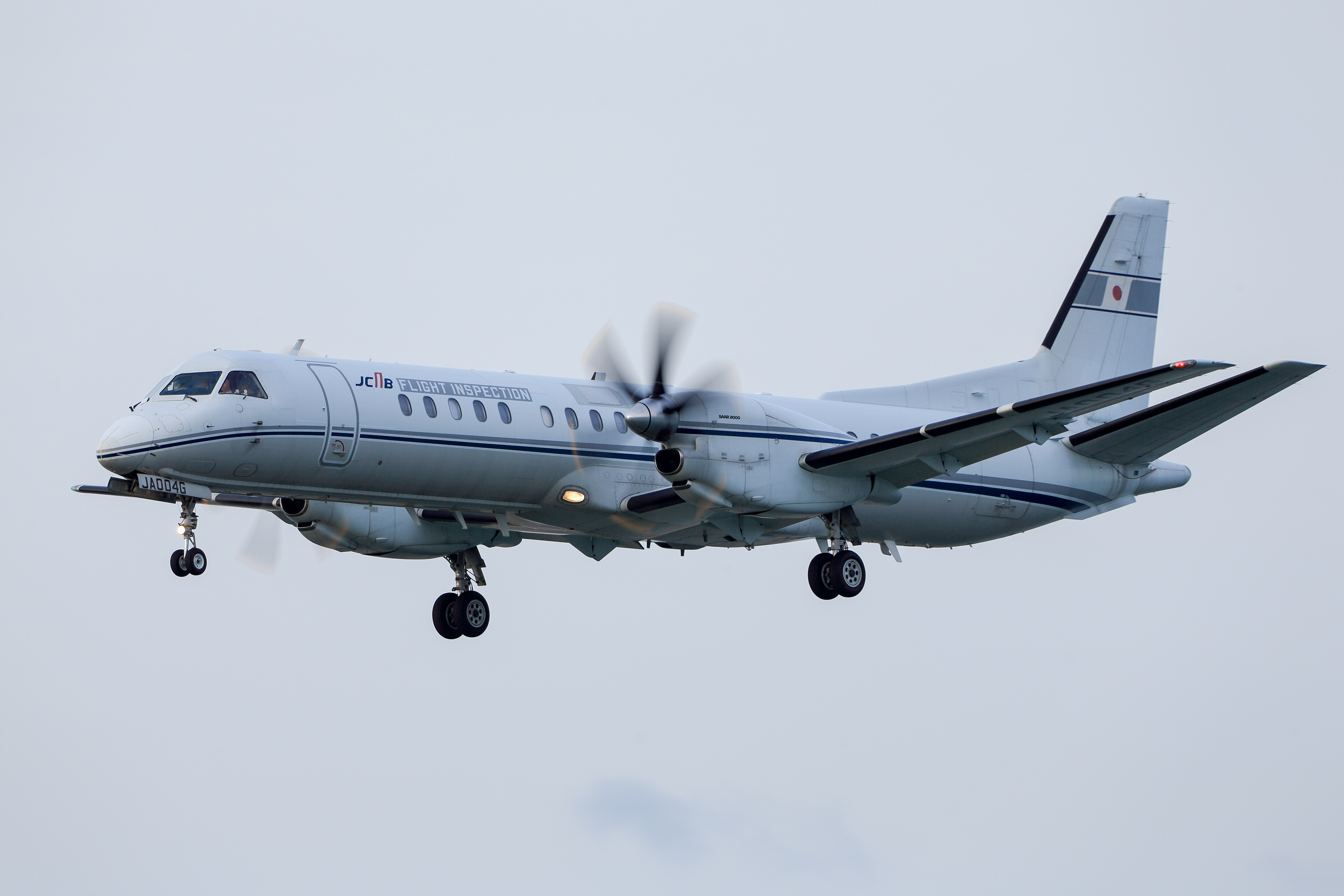 新潟空港で撮影された、飛行検査中の国土交通省航空局JA004G